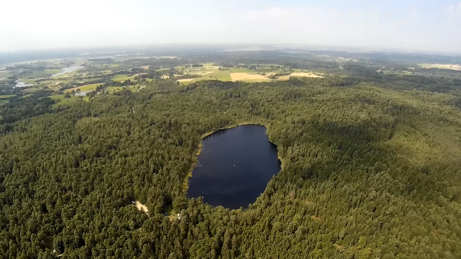 Vaizdas iš viršaus